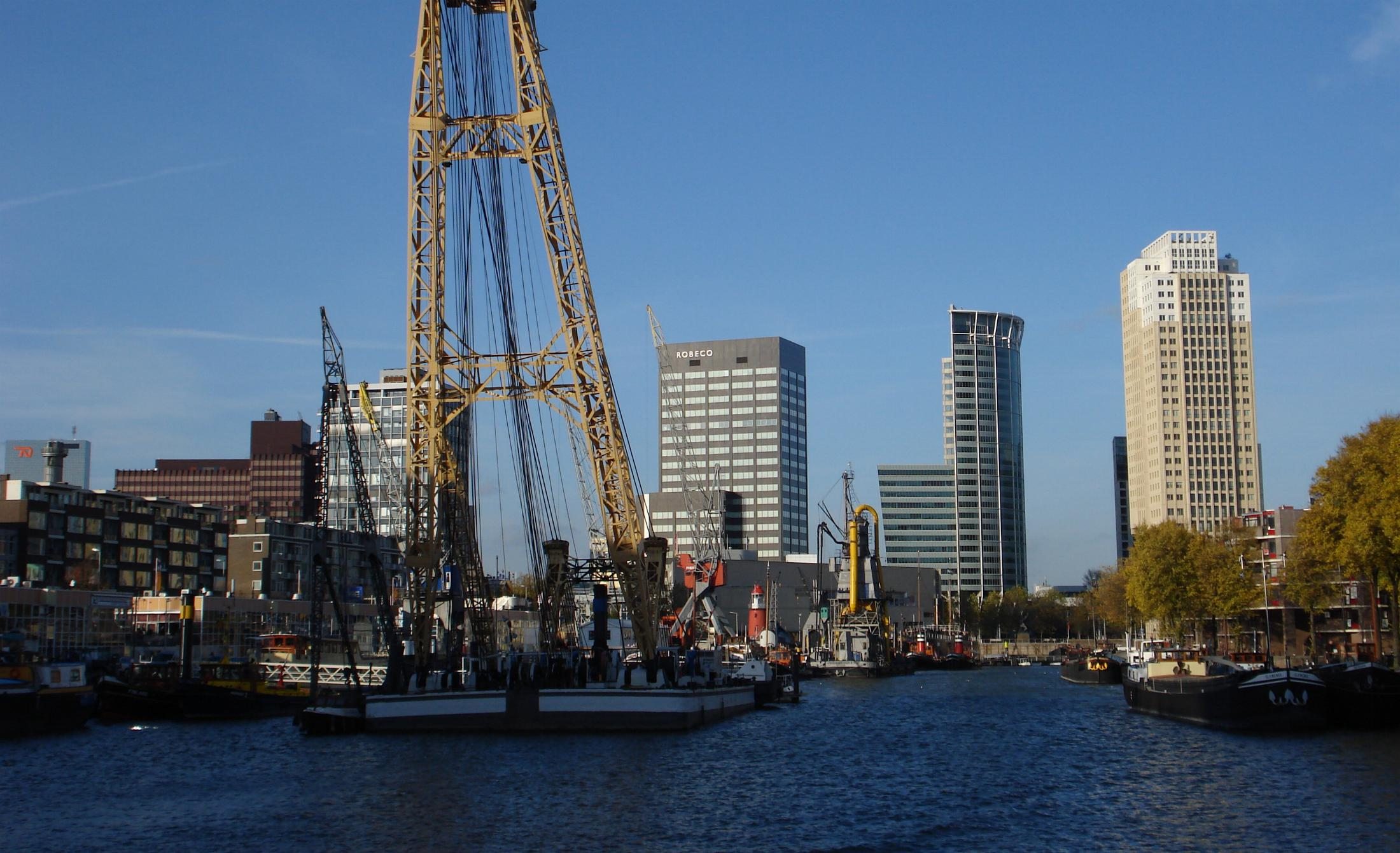 Rotterdam, Leuvehaven.